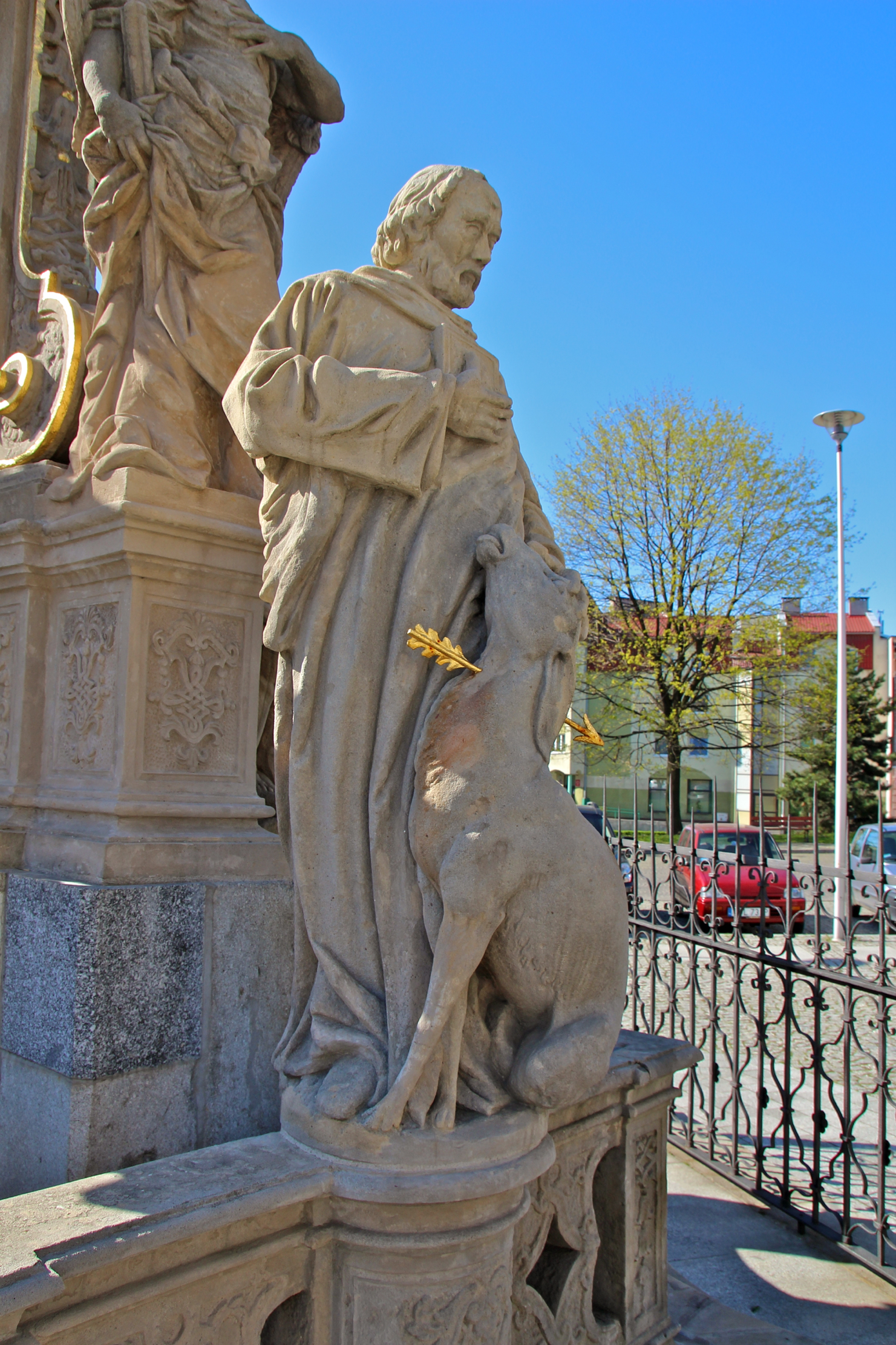 Głubczyce - miasto w Polsce położona w województwie opolskim, w powiecie głubczyckim.